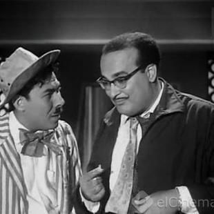 بيجو وابو لمعة